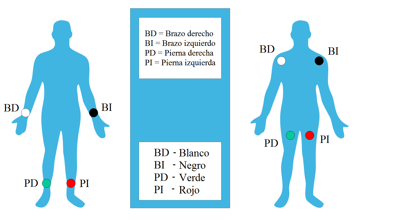 Derivaciones del electrocardiograma